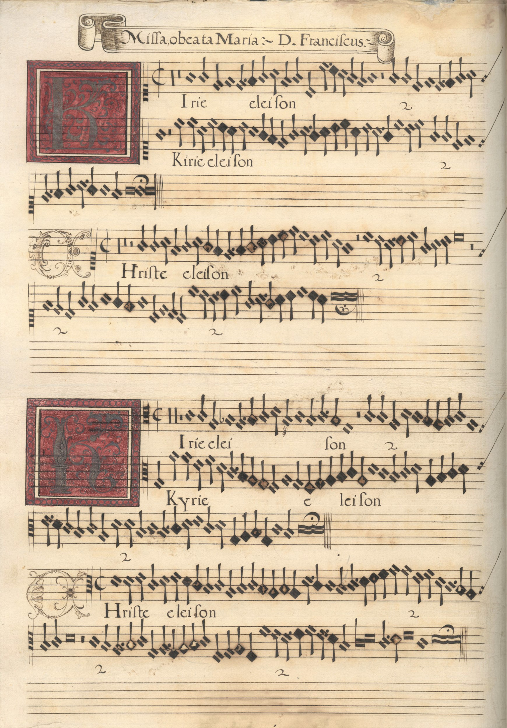 "Kyrie", Parte da Missa O Beata Maria, fac-símile de um manuscrito de uma obra de Francisco de Santa Maria.